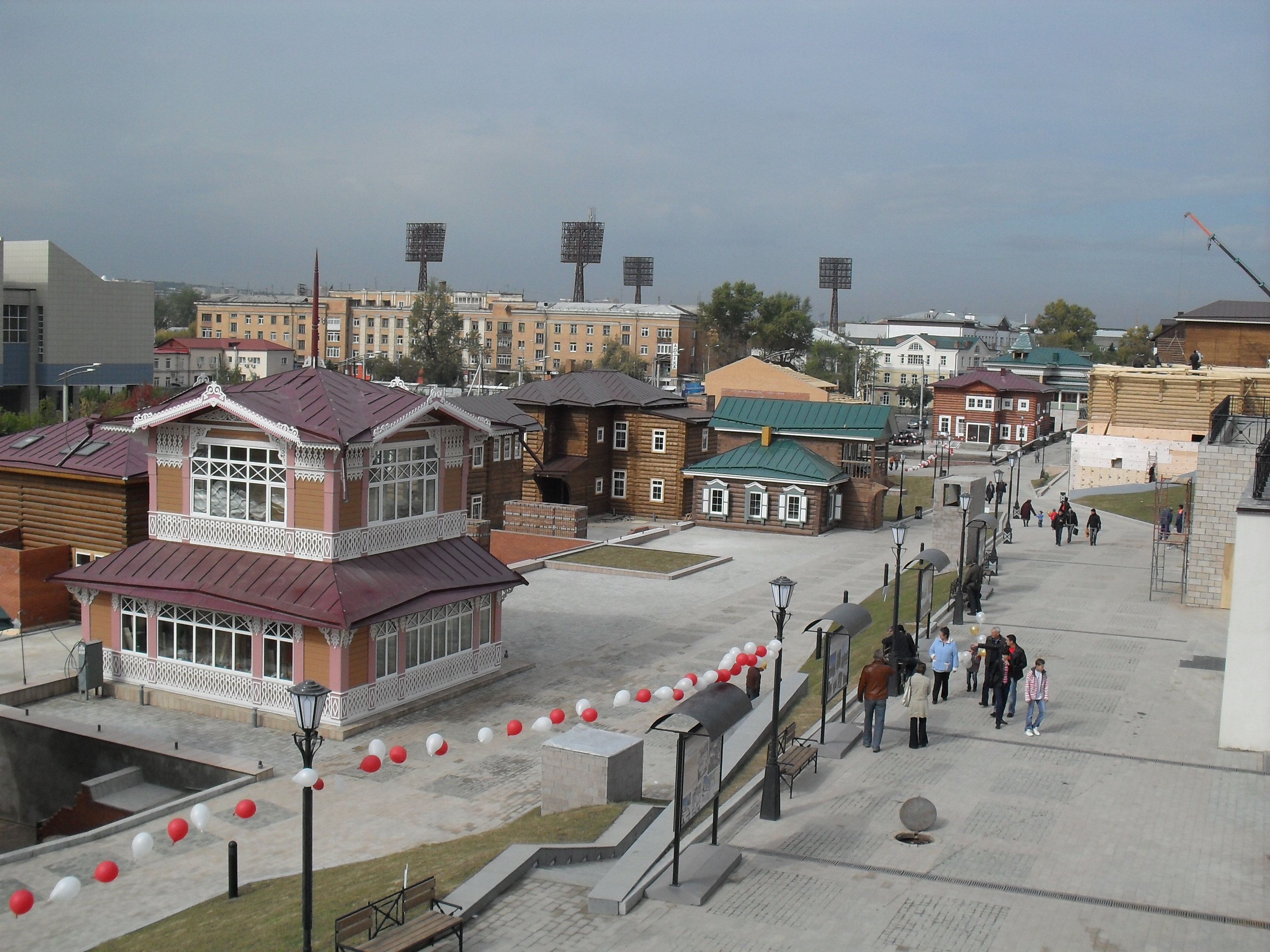 Иркутск. Иркутск. 130-й квартал